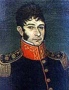 Nicolás Rodríguez Peña. Óleo de J. Gil de Castro. MHN